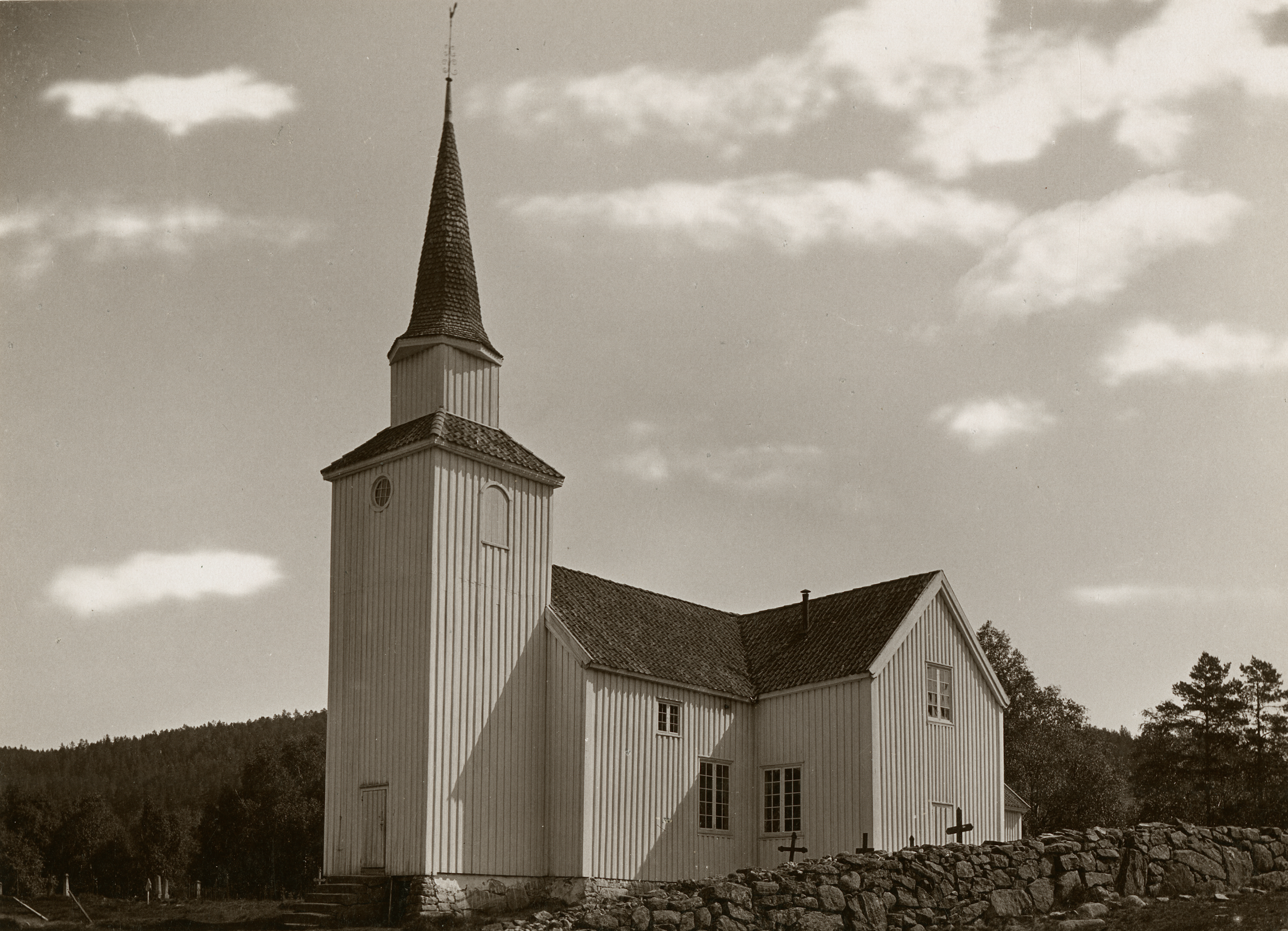 Bjelland kirke i Bjelland, Vest-Agder This image on crowdsourcing geotagging platform Fotodugnad